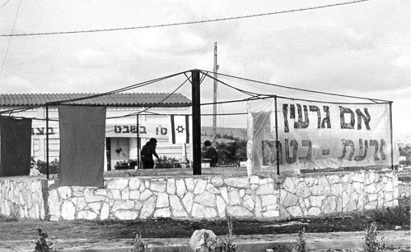 טקס נטיעות ט"ו בשבט בהיאחזות צבעון